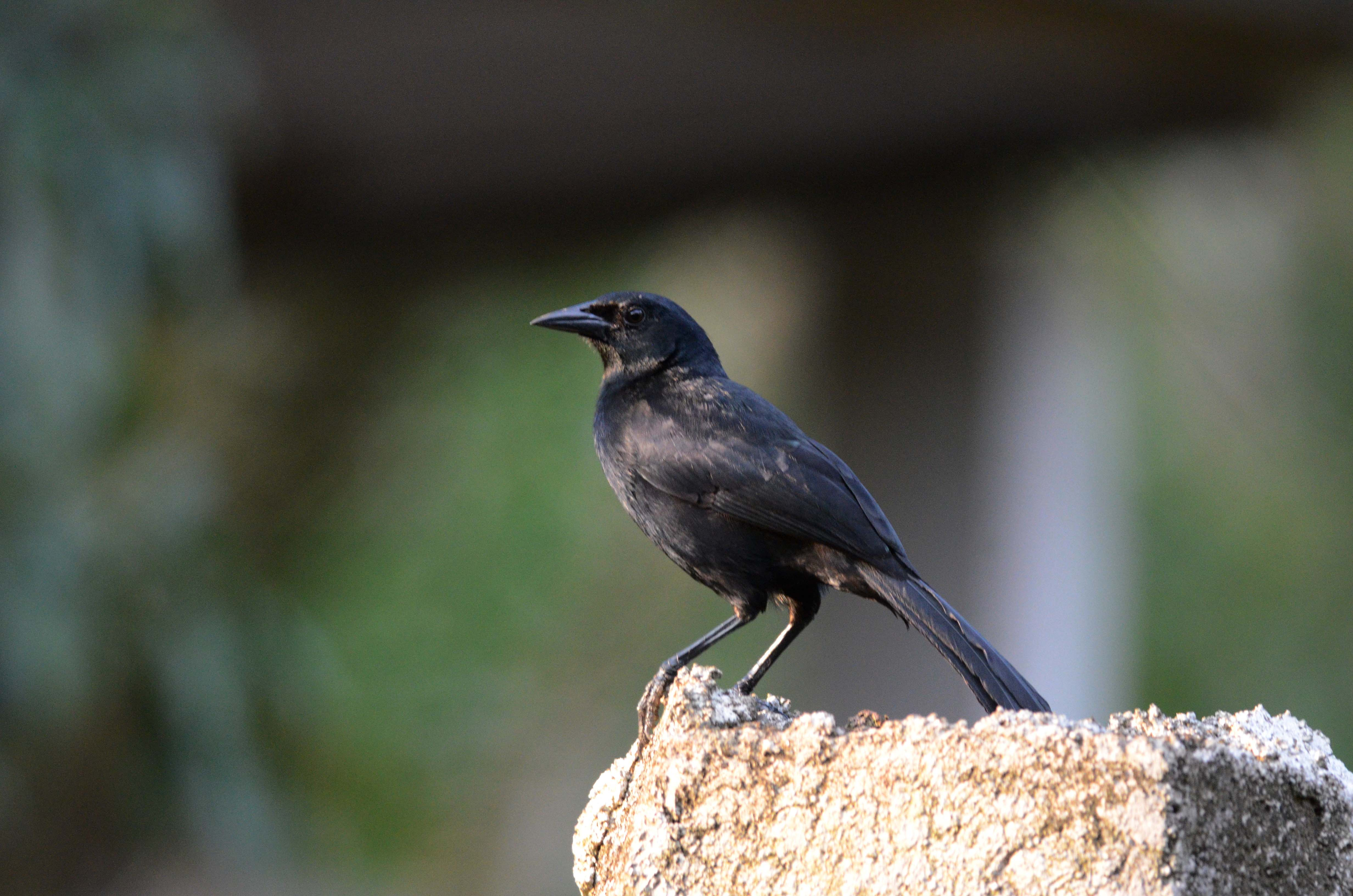 Selva El Marinero, Ejido Adolfo López Mateos, Catemaco, Veracruz, México.